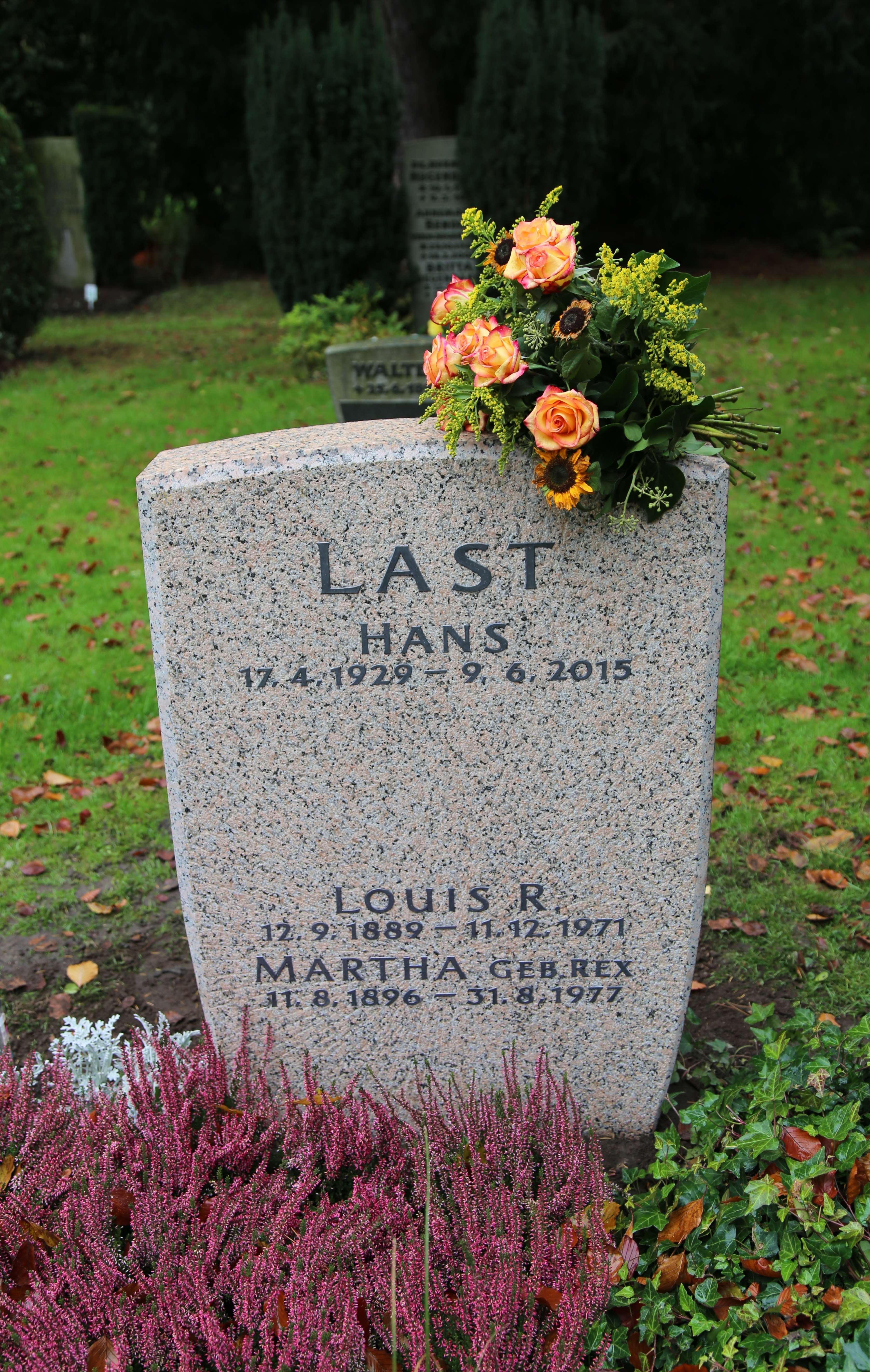 James Last (* 17. April 1929 in Bremen als Hans Last; † 9. Juni 2015 in West Palm Beach, Florida, Vereinigte Staaten)[1] war ein deutscher Bandleader, Komponist, Arrangeur und Musikproduzent.